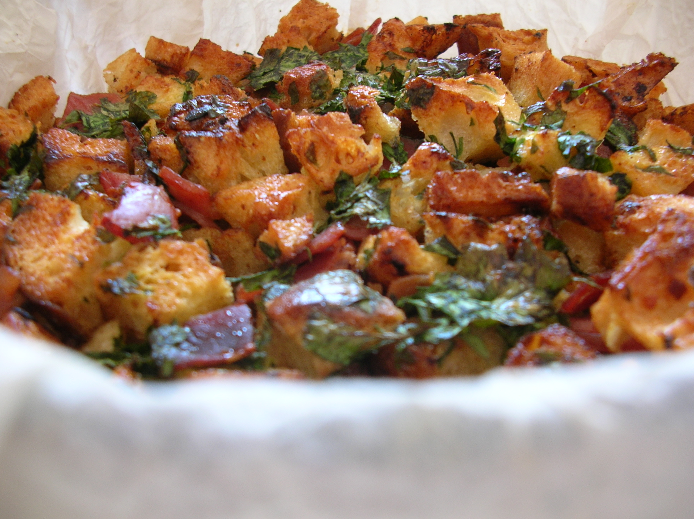 panzanella